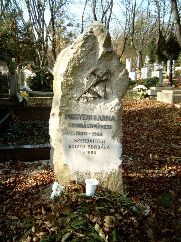 Megyeri Barna (Nagyvárad, 1920. július 12.- Budapest, 1966. március 14.) szobrászművész sírja Budapesten. Farkasréti temető: 7/5-1-23 [szobrász: Megyeri Barna].